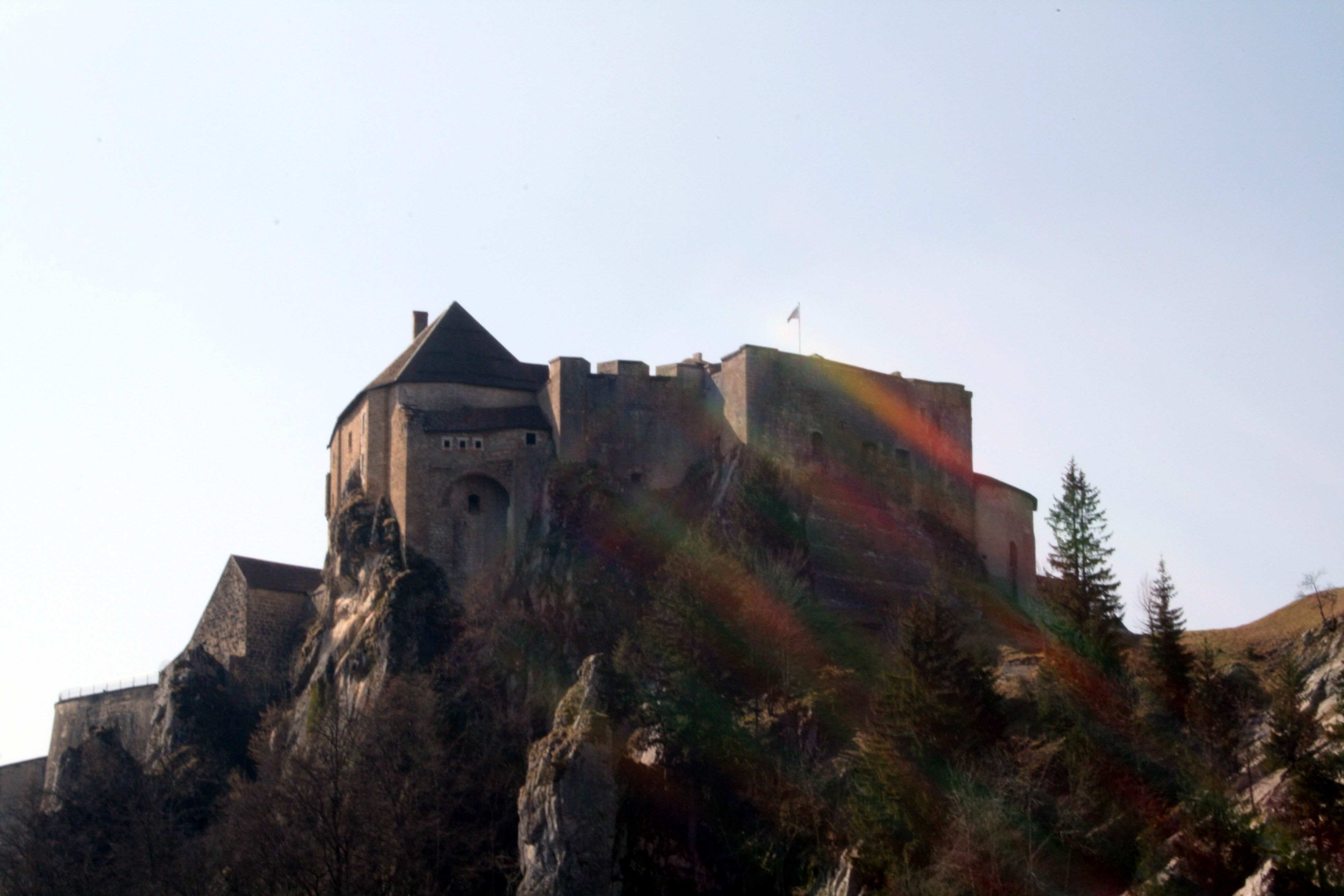 Chateau de Joux